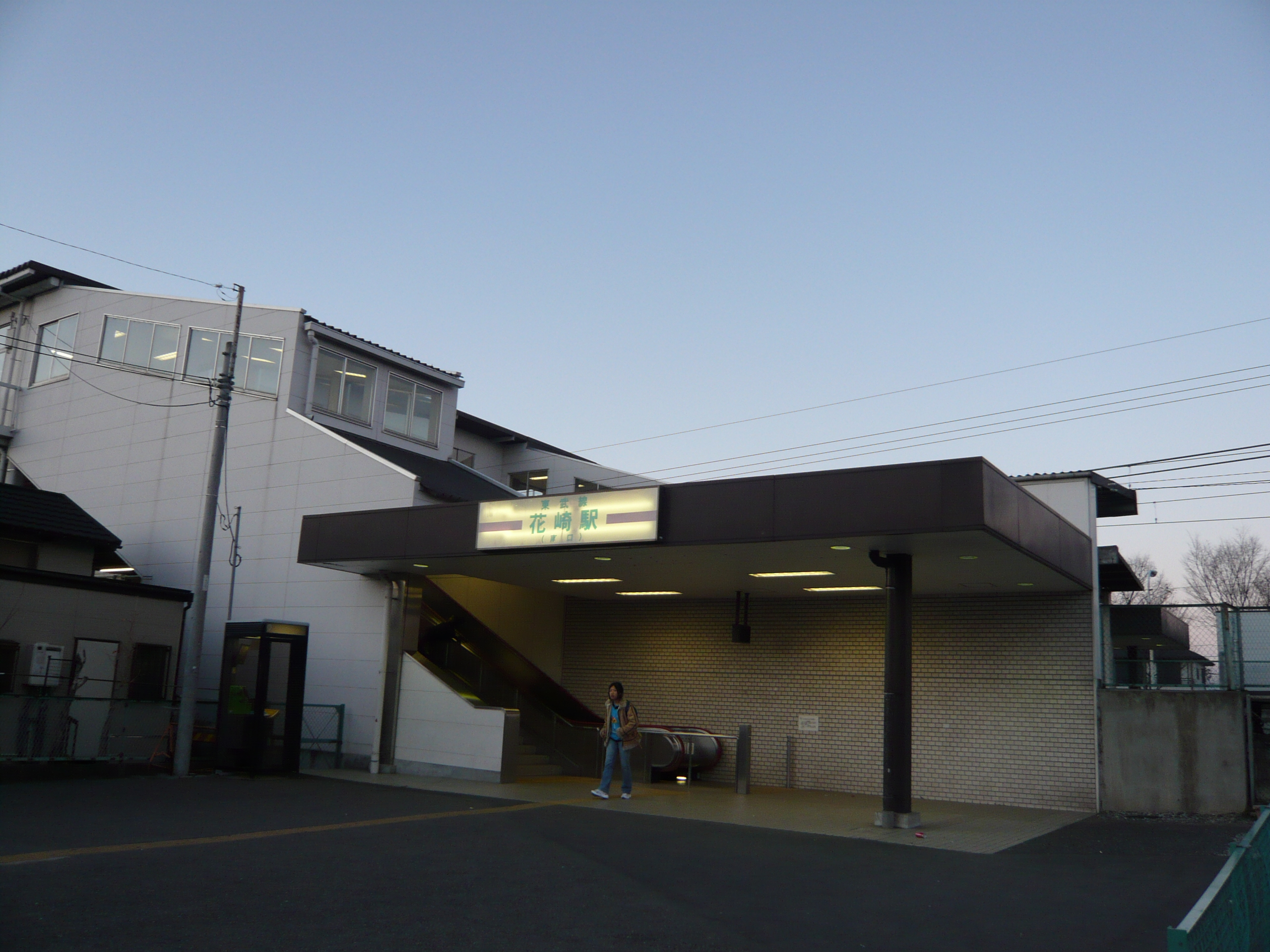 東武鉄道伊勢崎線花崎駅南口。